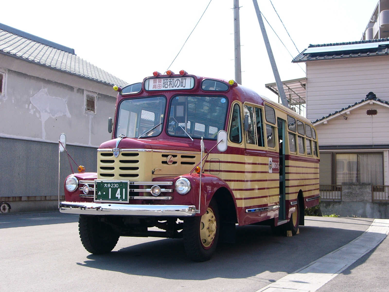 豊後高田市「昭和の町」で運行されるBX141